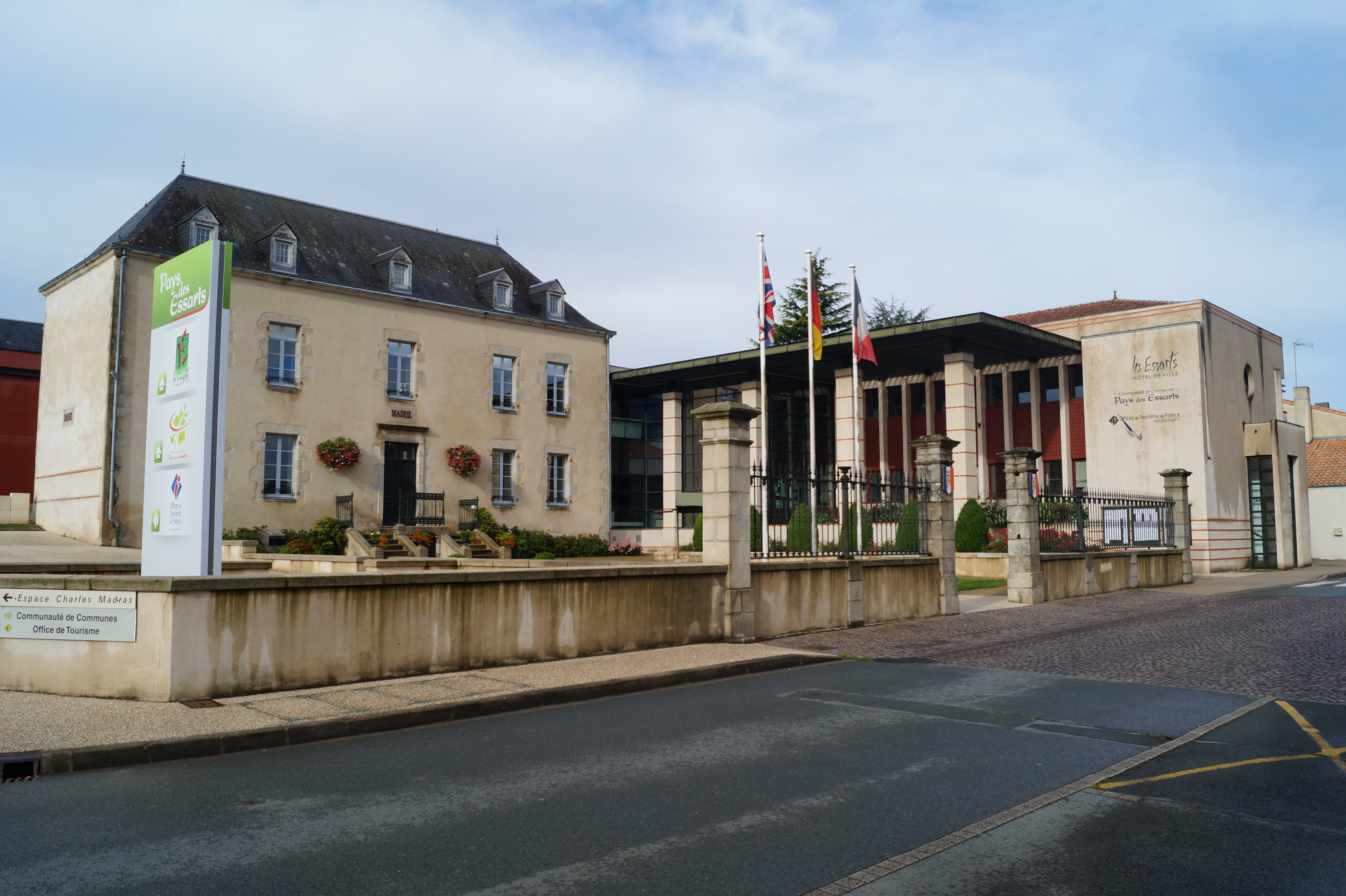 La mairie des Essarts.